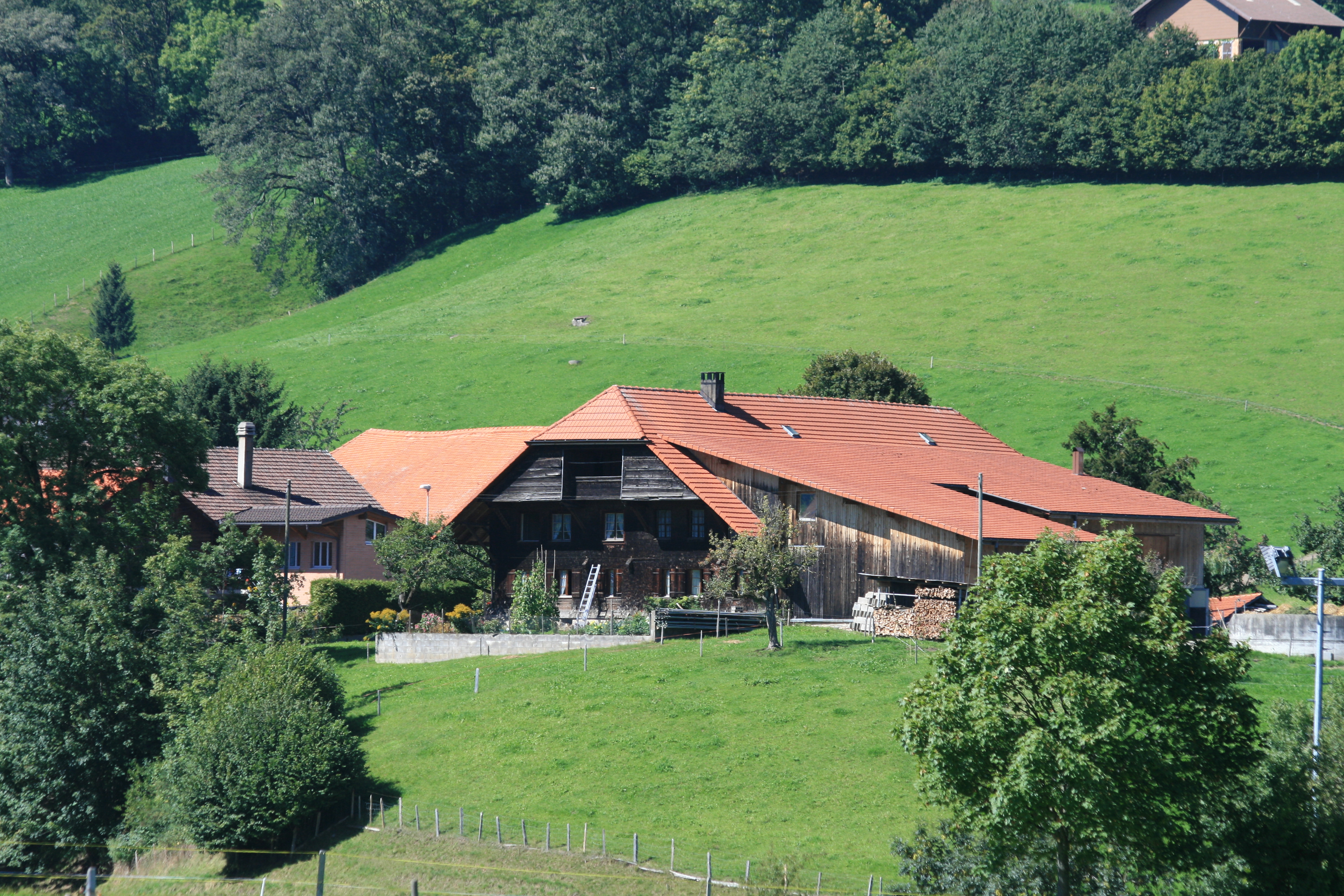 Bauernhaus in Oberschrot, Kanton Freiburg, Schweiz